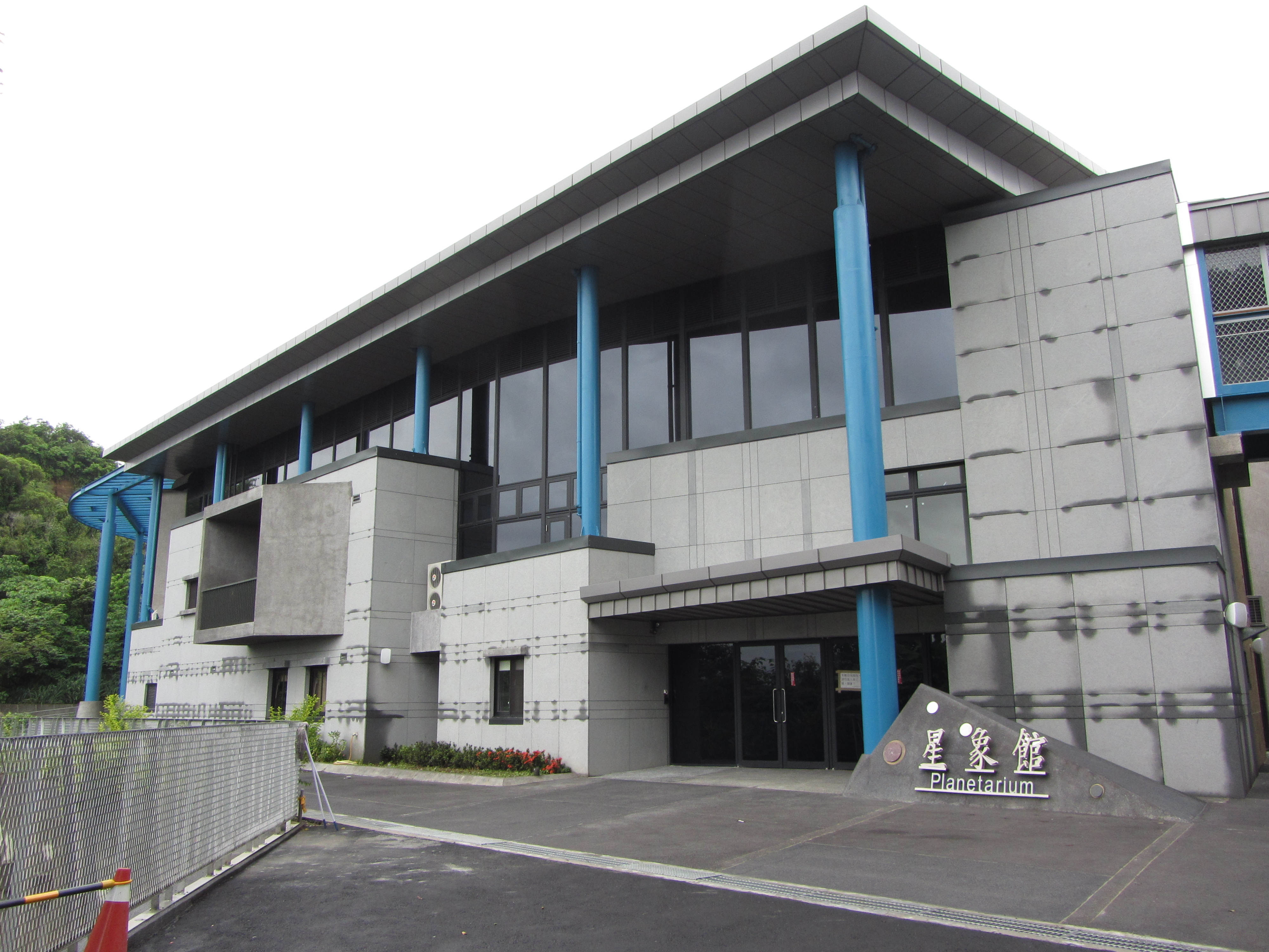 南瀛天文教育園區星象館。